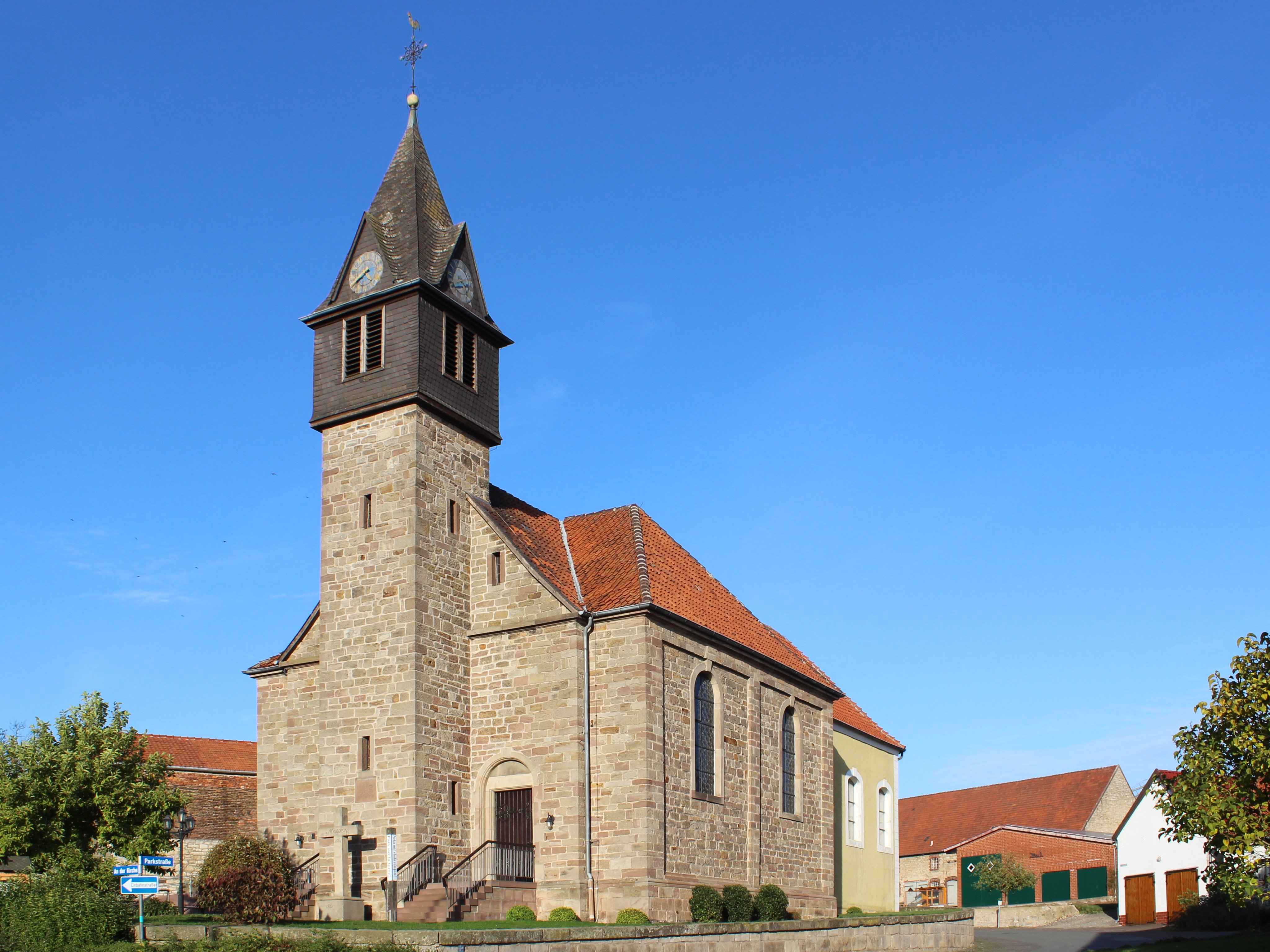 kath. Kirche St. Antonius von Padua in Menne, Stadt Warburg, Ansicht von SüdwestenThis is a photograph of an architectural monument. –920